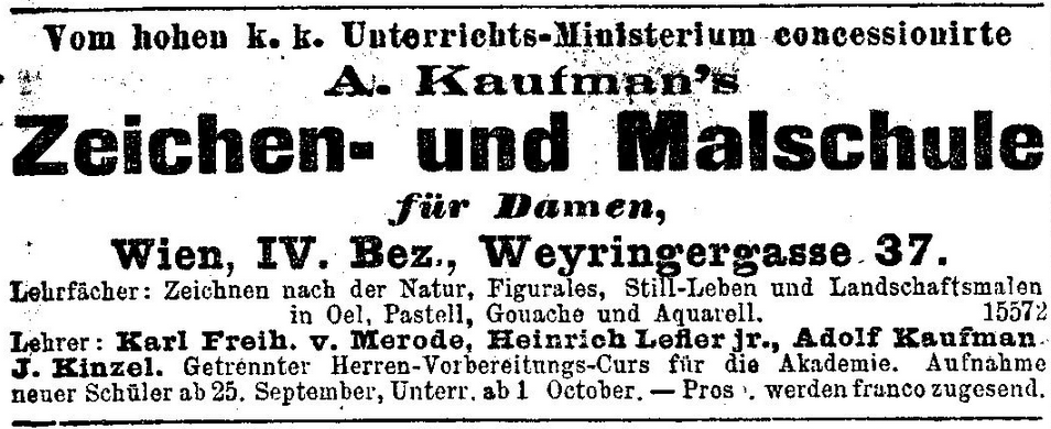 Adolf Kaufmann und Karl Freih. v. Merode - Inserat der Malschule von 1898 in Neue Freie Presse, Wien